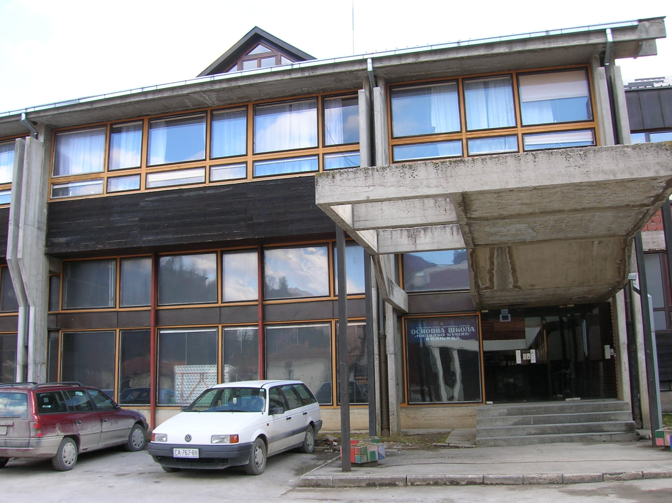 OŠ Milenko Kušić Ivanjica